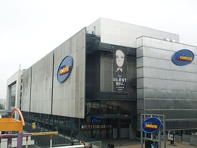 Le cinéma UGC Ciné Cité de Créteil